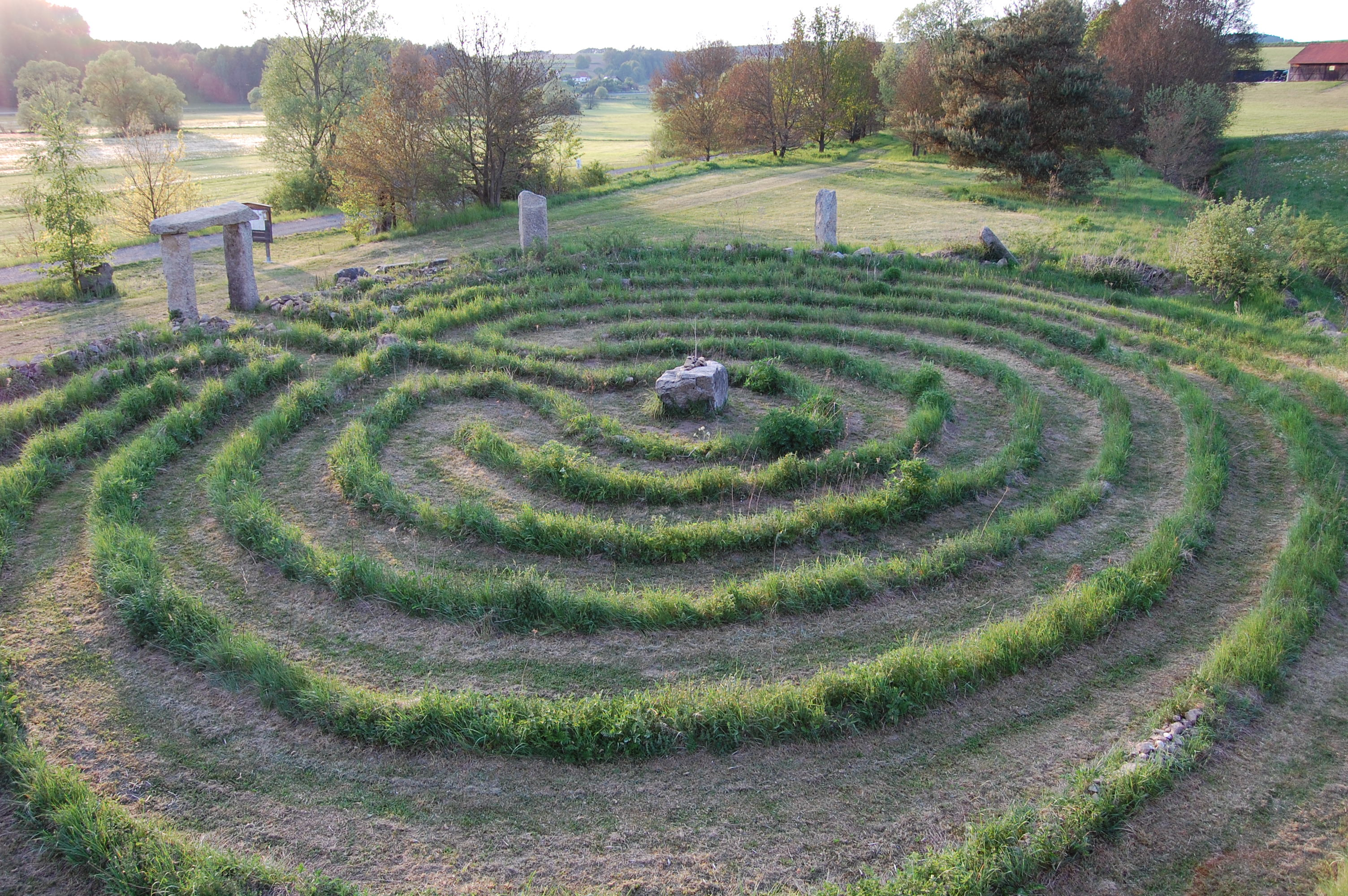 Trojaburg Uckersdorf beim Radlerbahnhof Schwarzhofen am Bayrisch - böhmischen Freundschaftsweg, Markt Schwarzhofen, Landkreis Schwandorf, Oberpfalz, Bayern (2011)